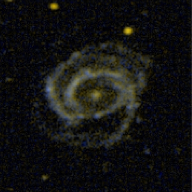 NGC 266